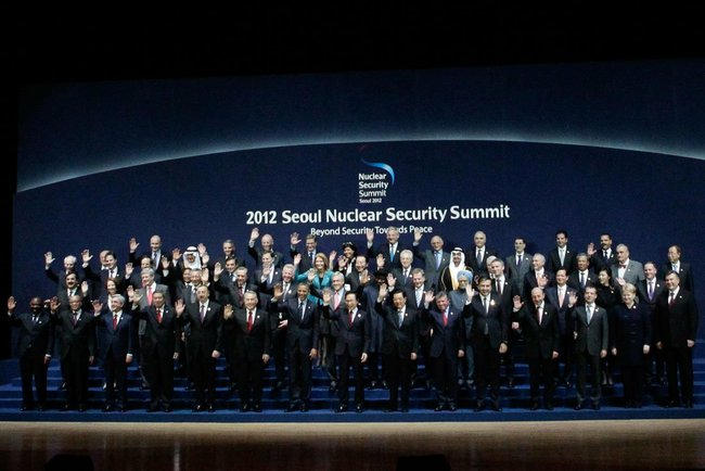 Участники саммита по ядерной безопасности.